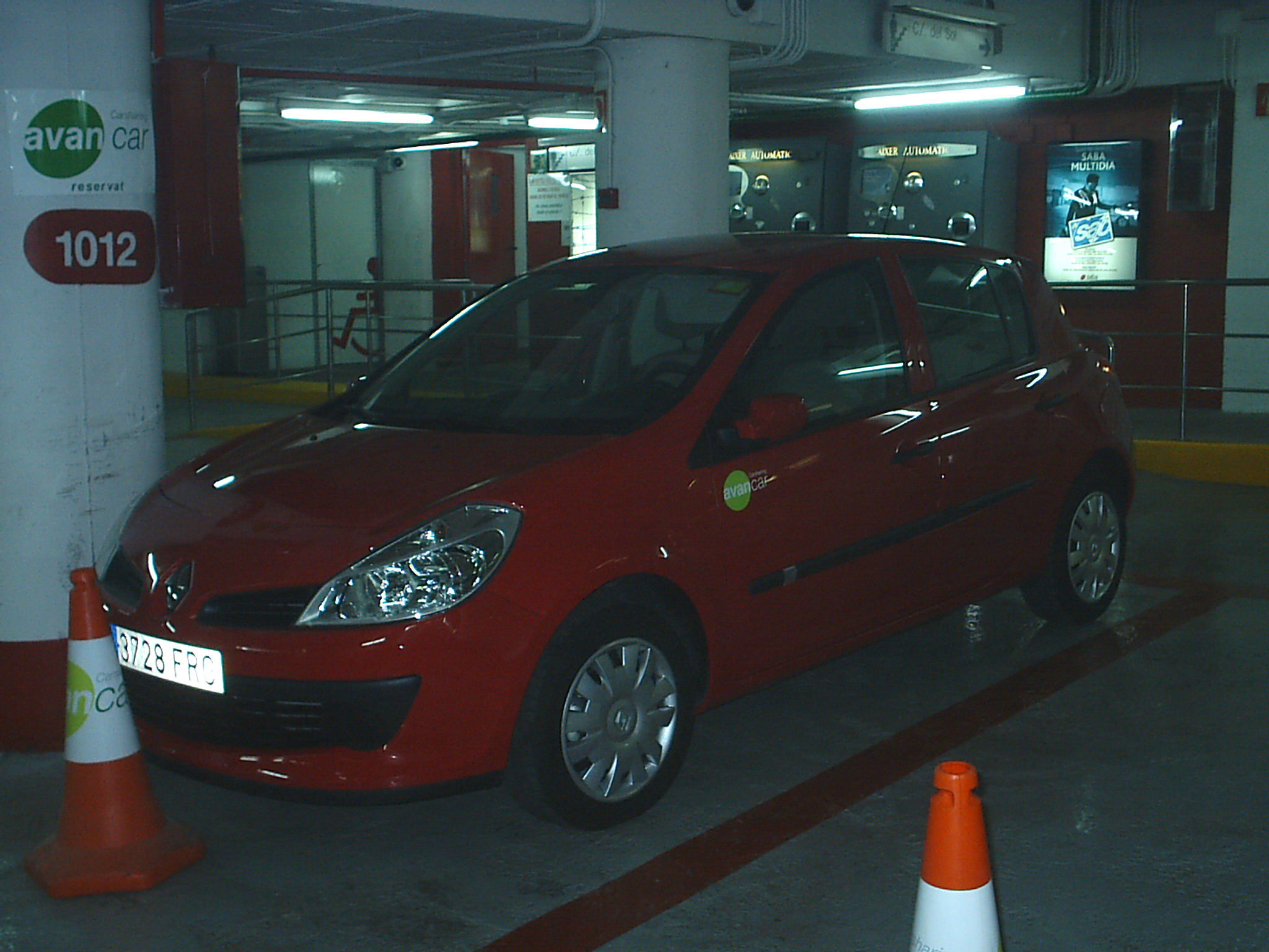 Renault Clio d'Avancar Carsharing a l'aparcament de la Pl. el Dr. Robert de Sabadell